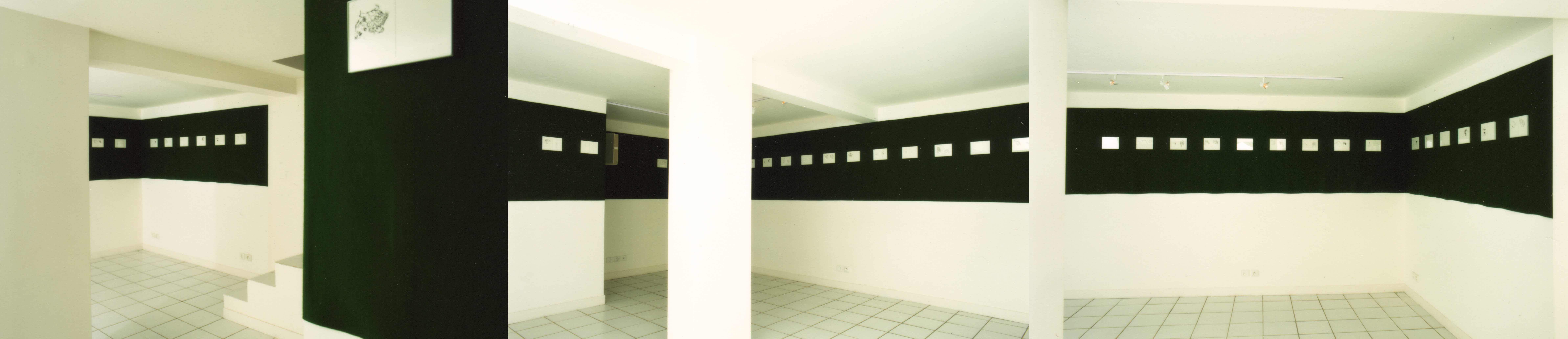 Emmanuel Fournier, Exposition "Diptyc'Domino", Galerie Françoise-Acat, Paris 1990